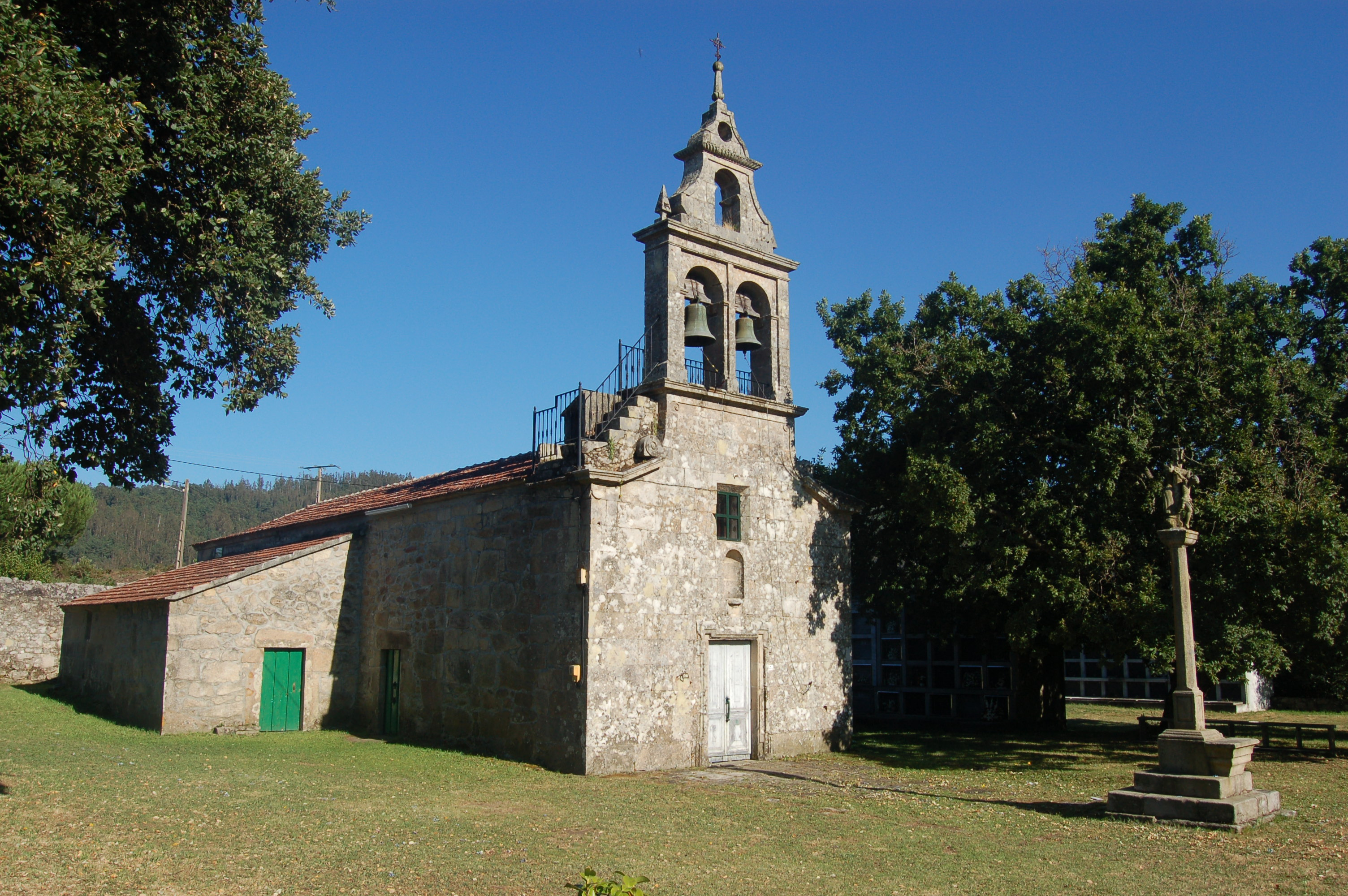 Igrexa parroquial de San Miguel de Barcala (A Estrada)